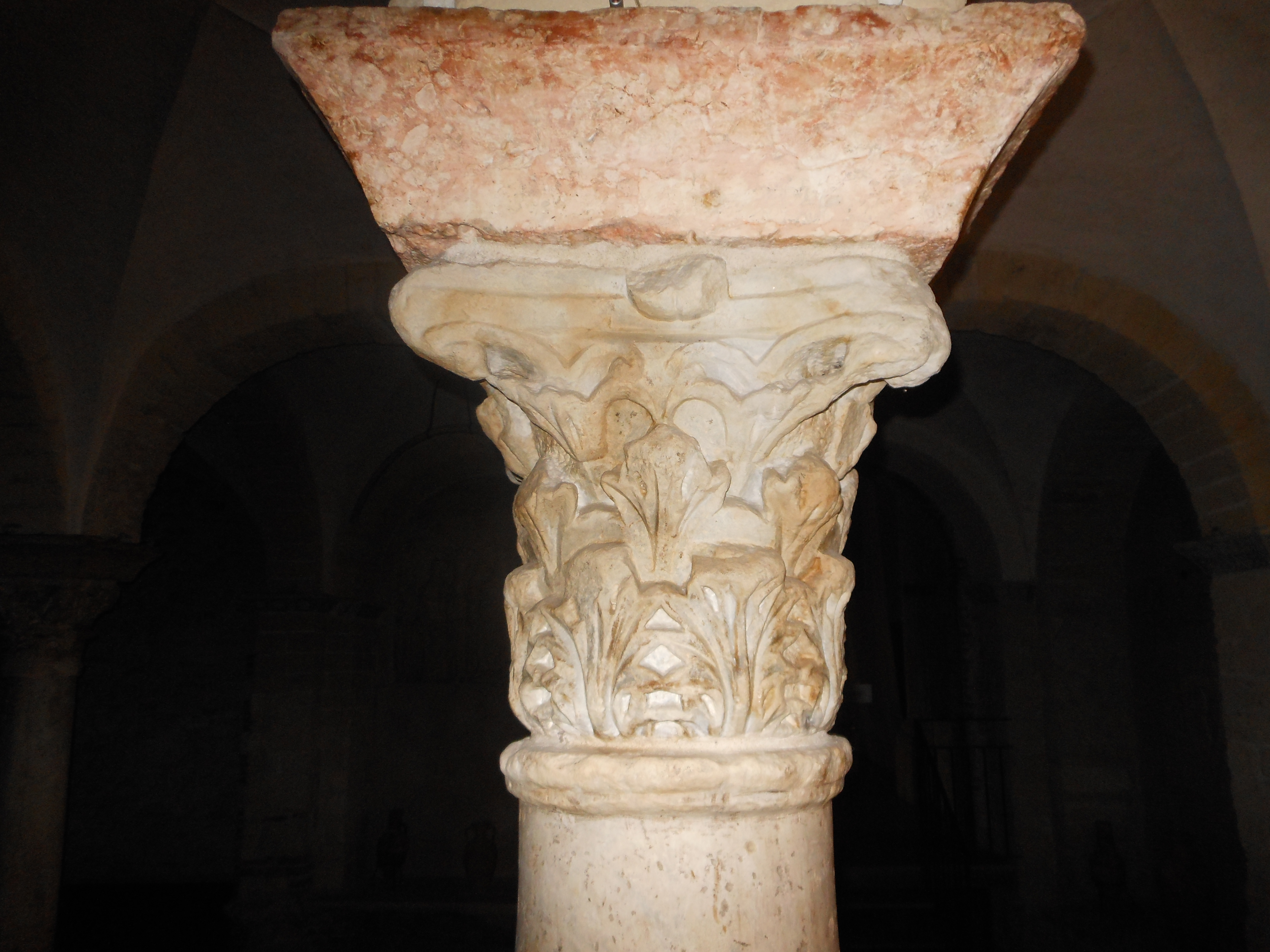 Colonna nel vestibolo del Duomo di Verona